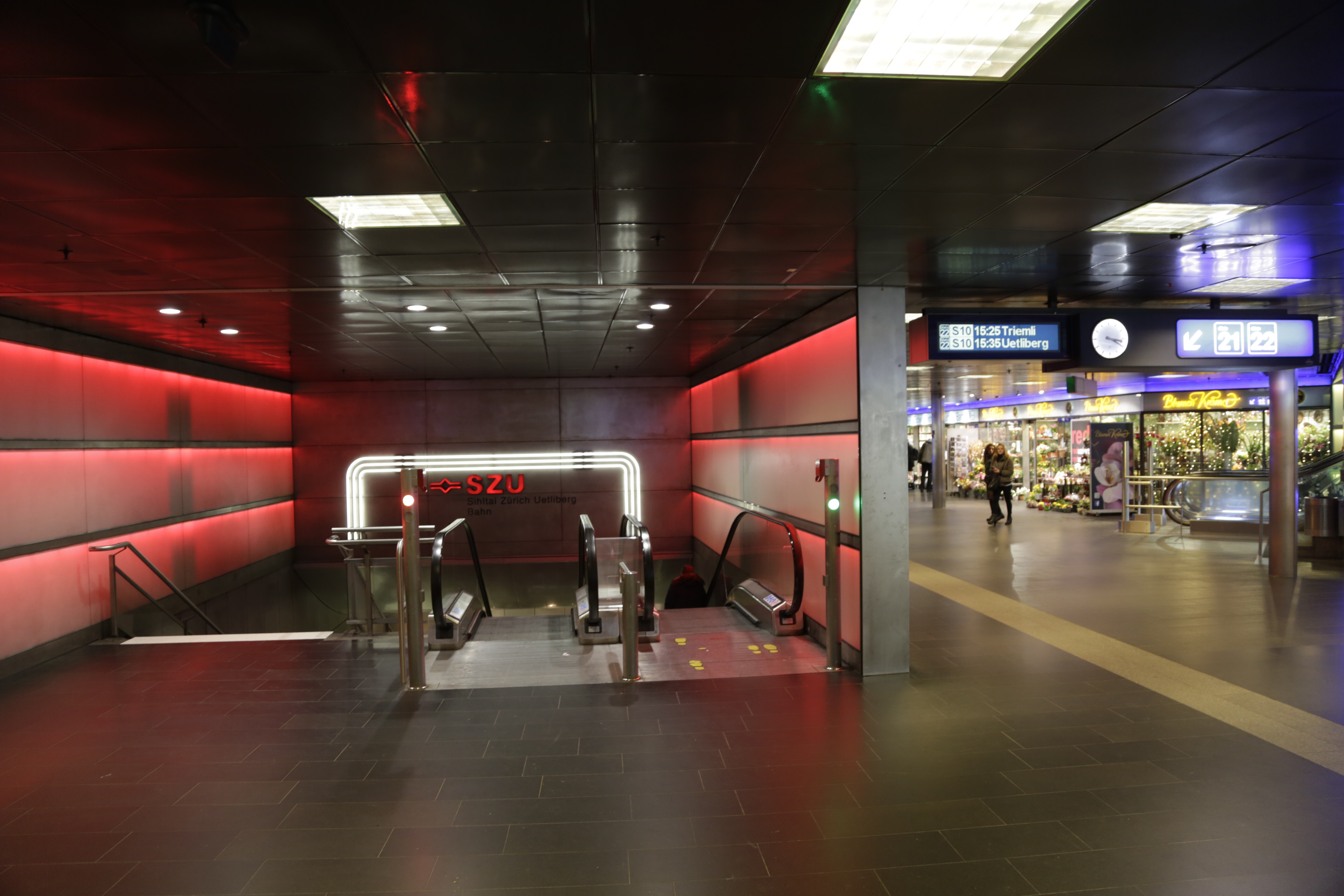 Impresionen aus dem SZU Bahnhof